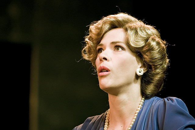 Ensaio Geral da Peça de Teatro que retrata a vida de Aristides de Sousa Mendes, Cônsul de Bordéus do Regime do qual era Ministro dos Negócios Estrangeiros Salazar, responsável pela saída de mais de 10,000 refugiados de França em direcção a Espanha e mais tarde a Portugal. A peça estará em cena de 11 de Outubro a 25 de Novembro de 2007 no Teatro da Trindade. Encenação de Rui Mendes.